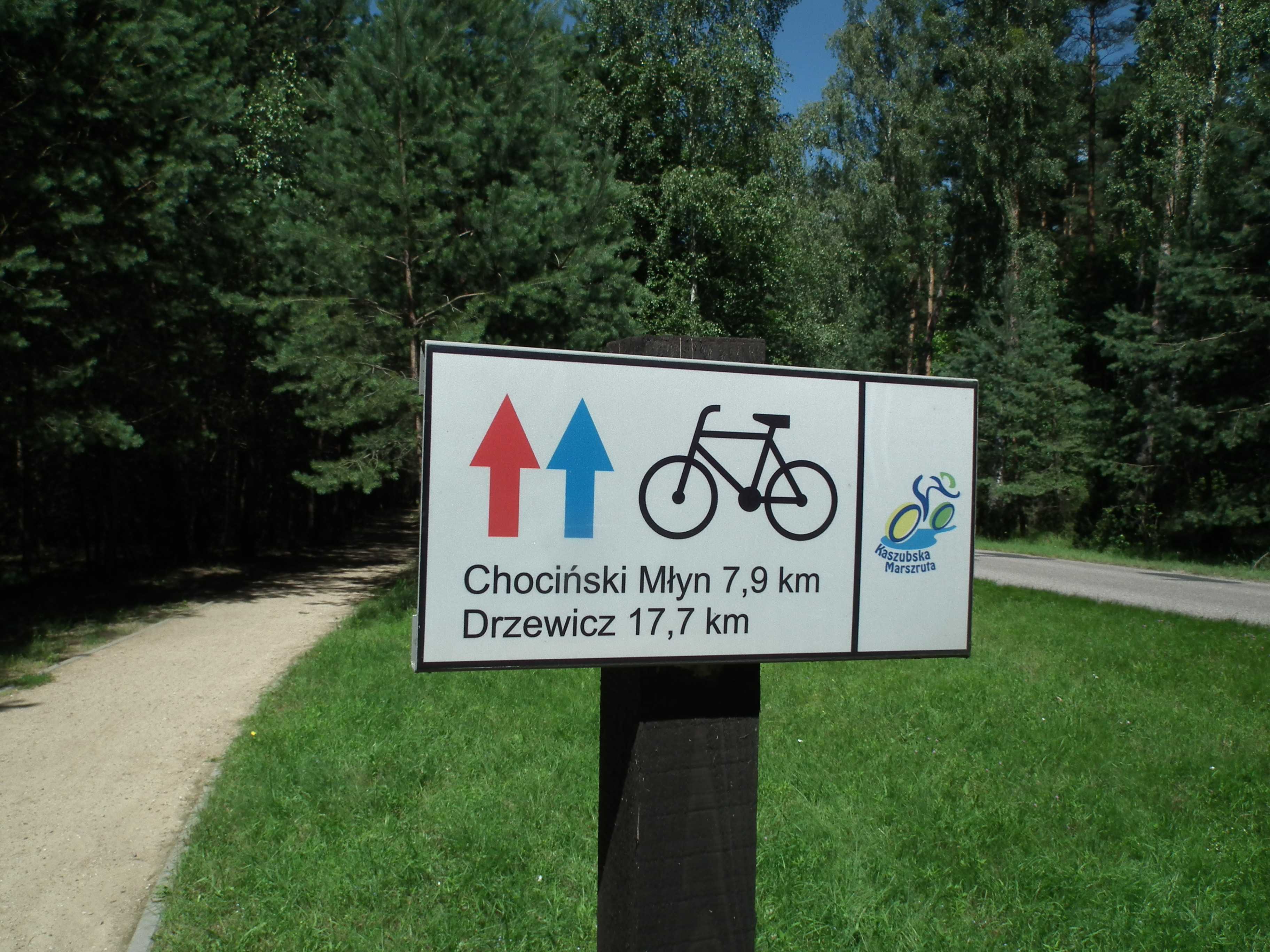 Szlak rowerowy w Bachorzu.